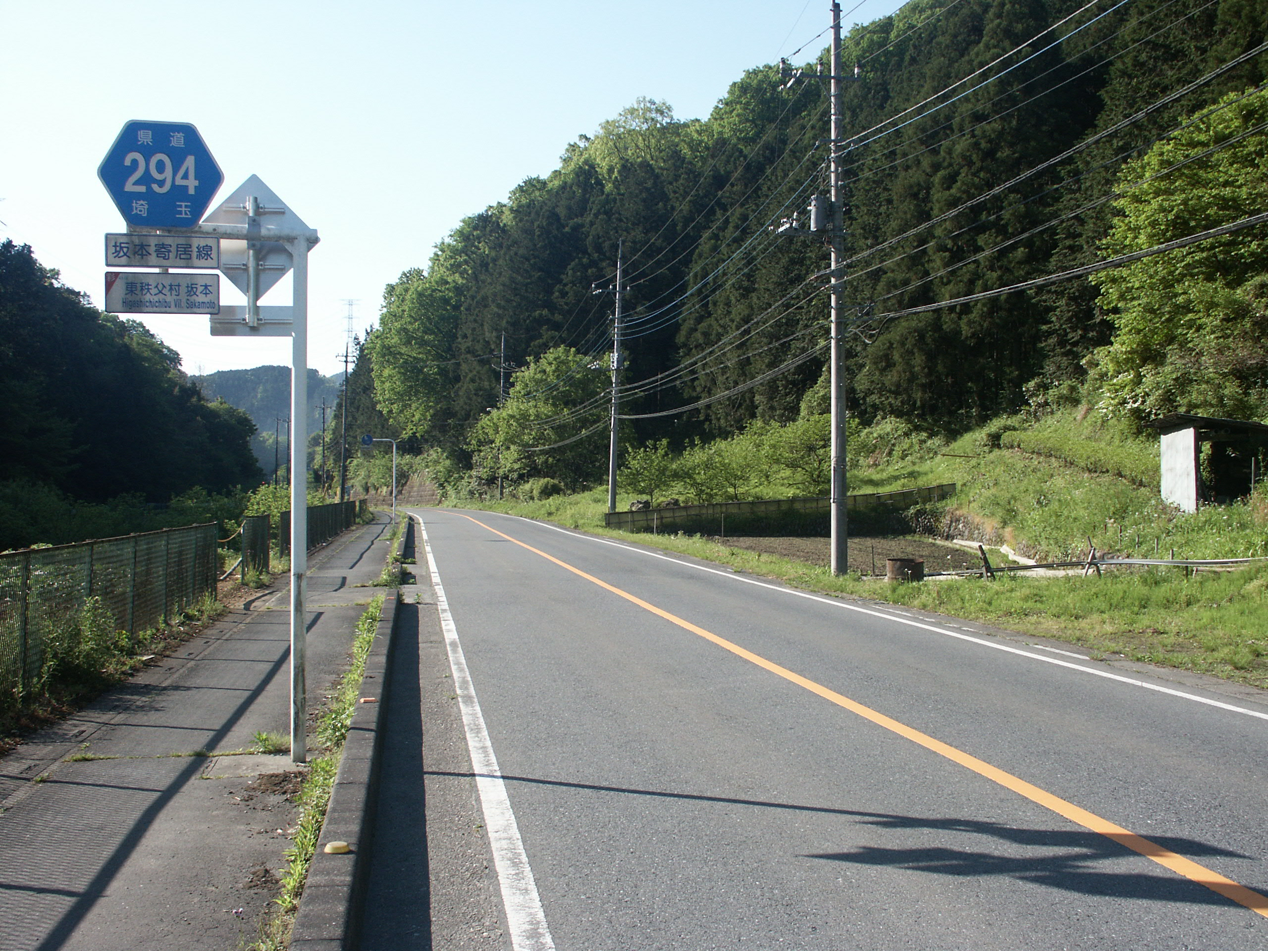 埼玉県道294号線東秩父村坂本付近